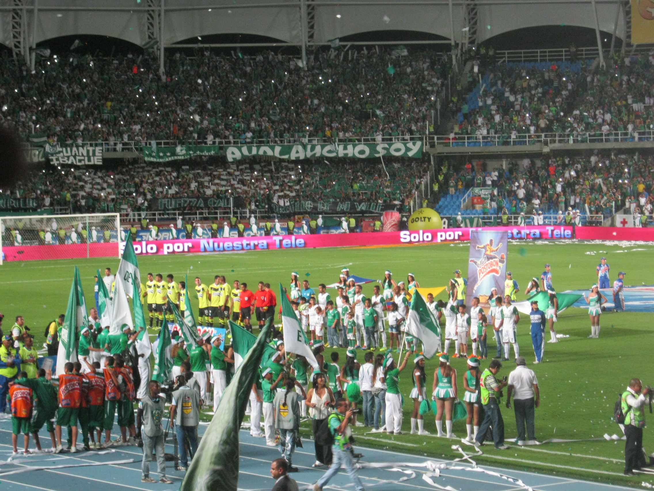 Primer encuentro de la final de la Liga Postobón 2013-II entre Deportivo Cali y nacional